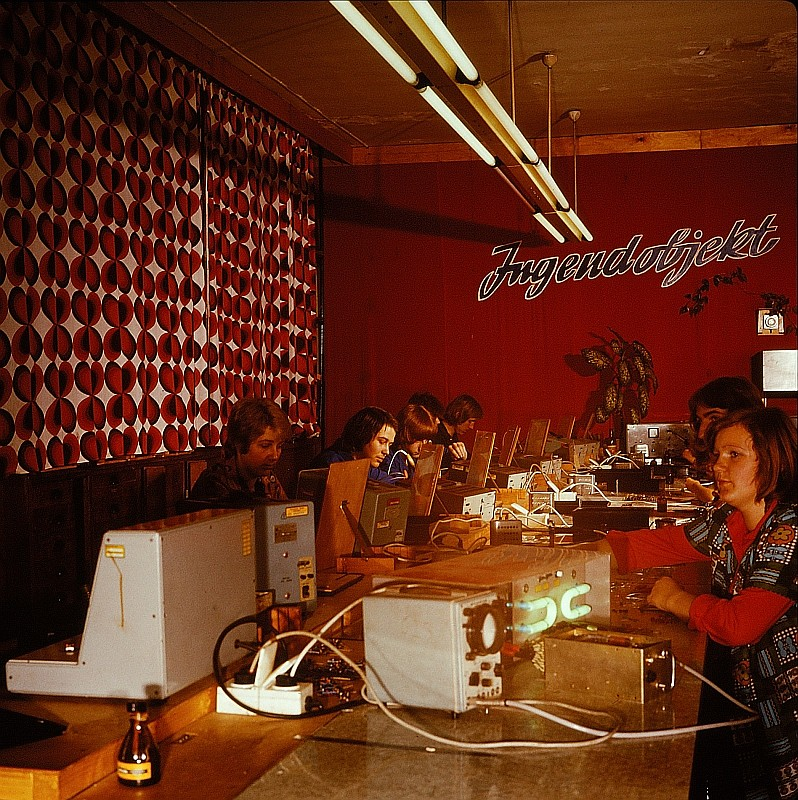 Original image description from the Deutsche Fotothek Elektronikfacharbeiter